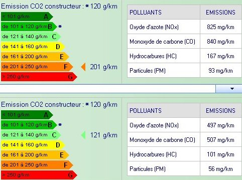 120 gr/CO2 prévue par le constructeur : 1er parcours: 201gr/CO2, 825mg/NOX, 840mg/CO! 2ème parcours121gr/CO2, 497mg/NOX, 507mg/CO